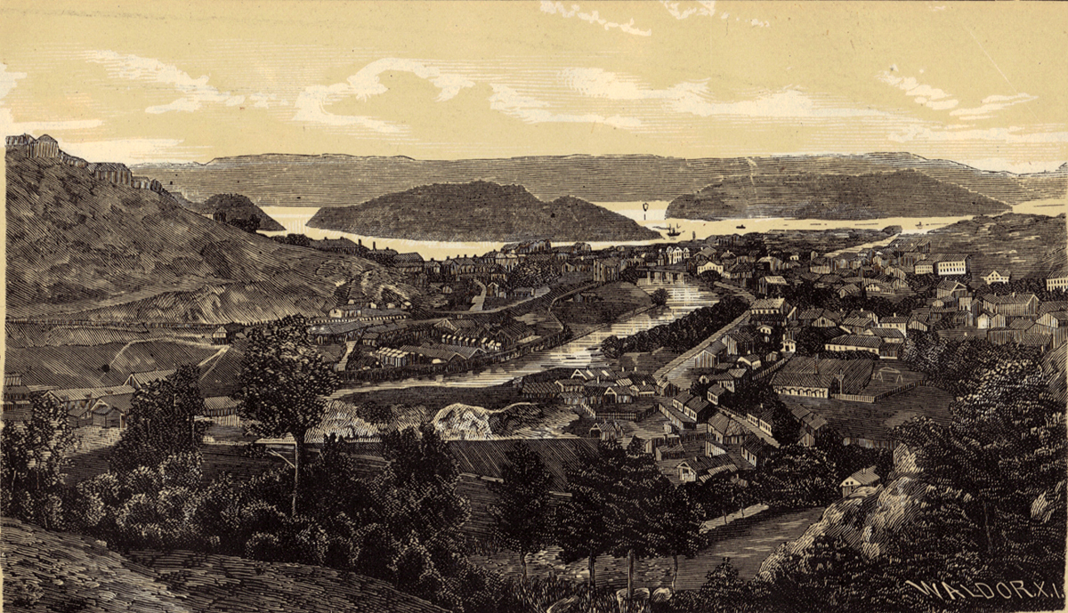 Fredrikshald (Halden), Norway.